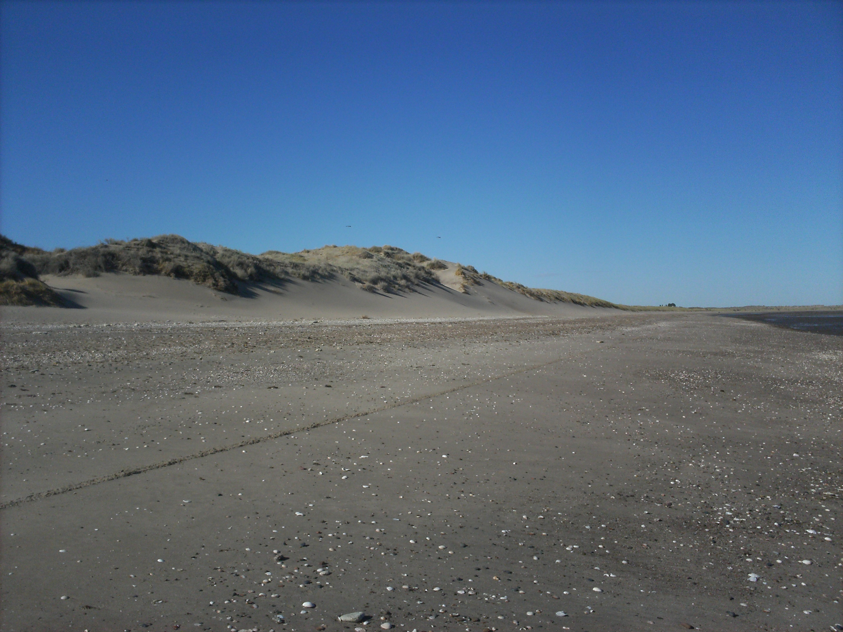 Vista de playas cercanas al pueblo rodeadas de abundantes medanos